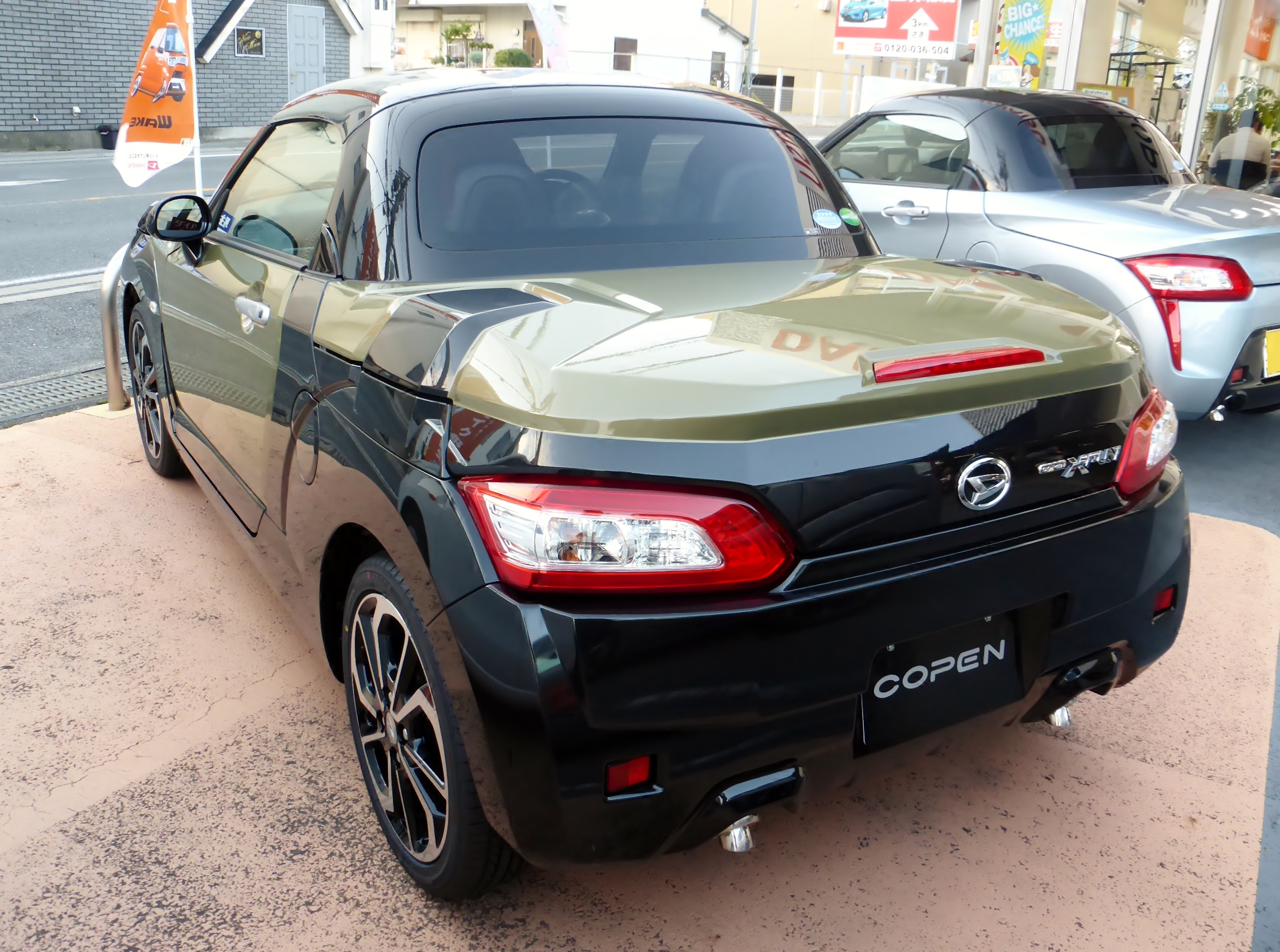 LA400K型ダイハツ・コペンエクスプレイをリアから撮影。